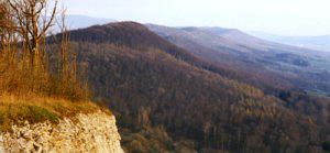 Blick über den bewaldeten Ith-Kamm gen Südosten, im Vordergrund ist das Kalkgestein sichtbar